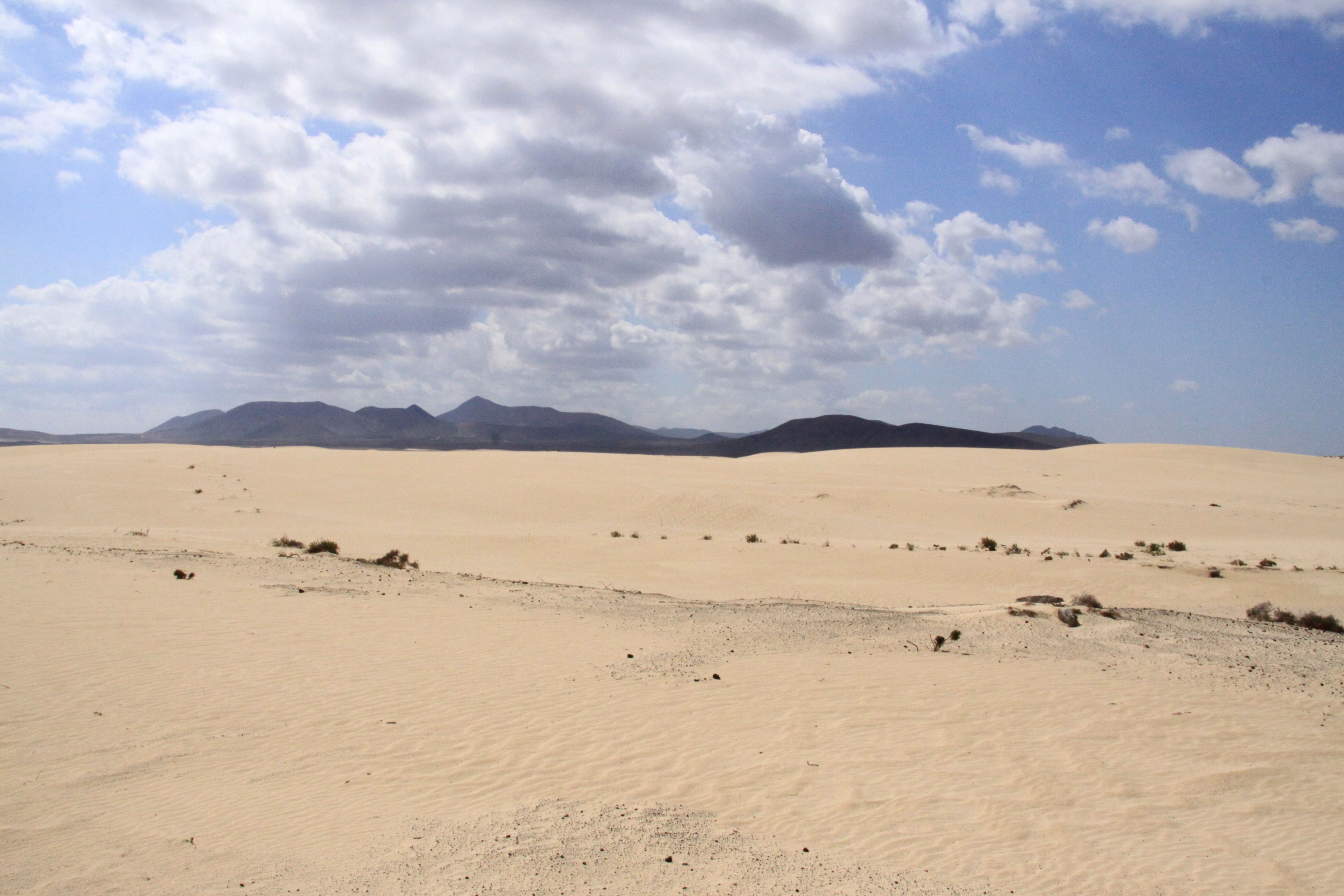 Parque Natural de las Dunas 1